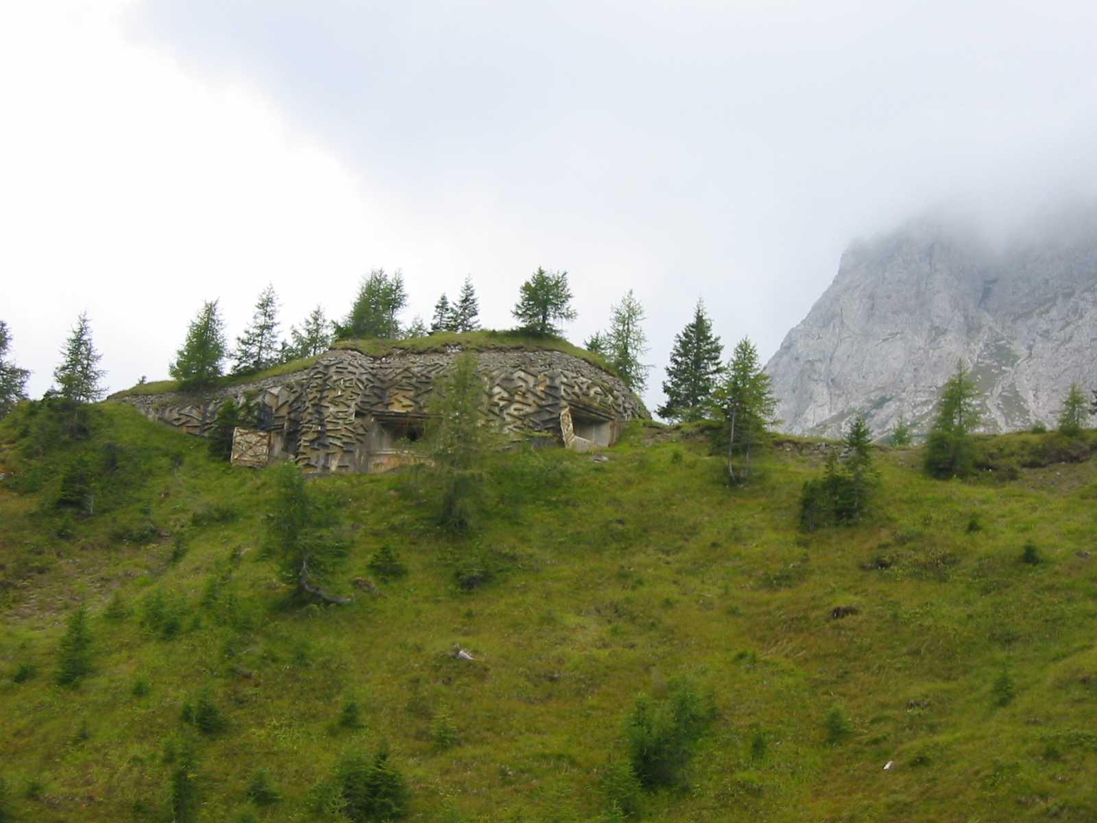 Foto scattata in settembre 2004 da Fantasy :-)